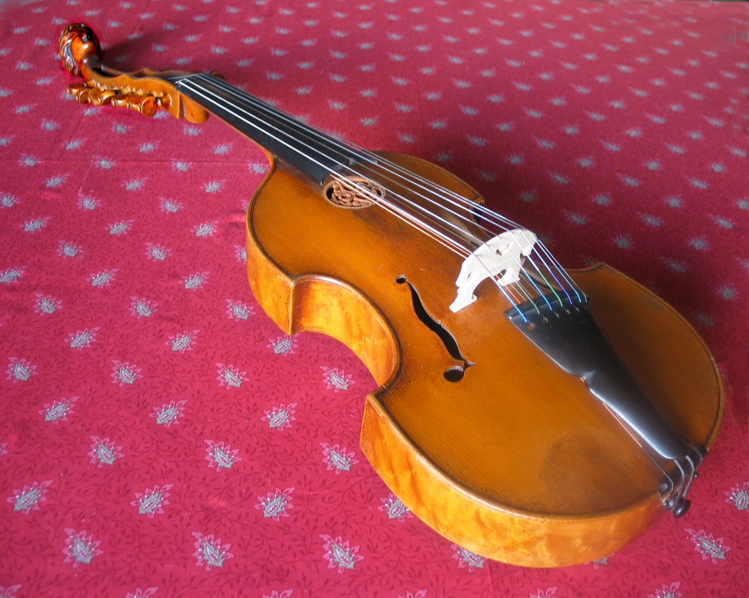 Viola d’amore um 1770, Joseph-Nicolas Leclerc au quinze-vingts Paris. Brandmarke: Leclerc 15-20 Paris